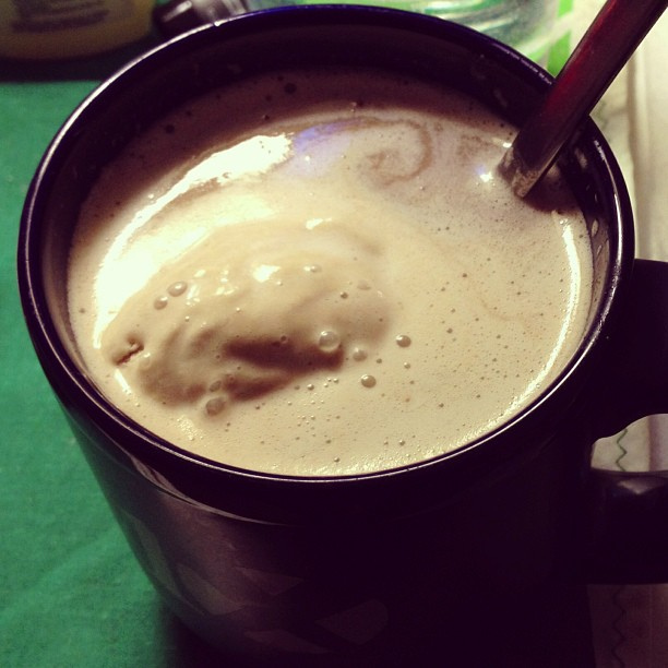 Hot buttered rum